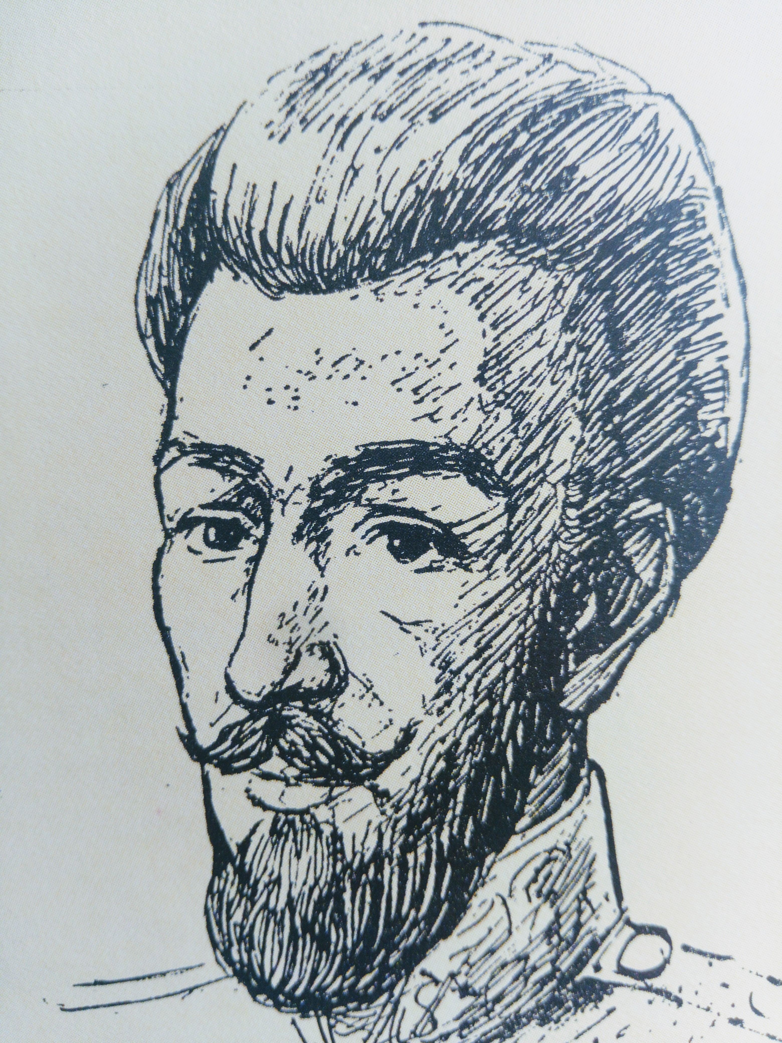 En esta imagen hay un grabado del militar español Agustín de Pinedo del siglo XVIII